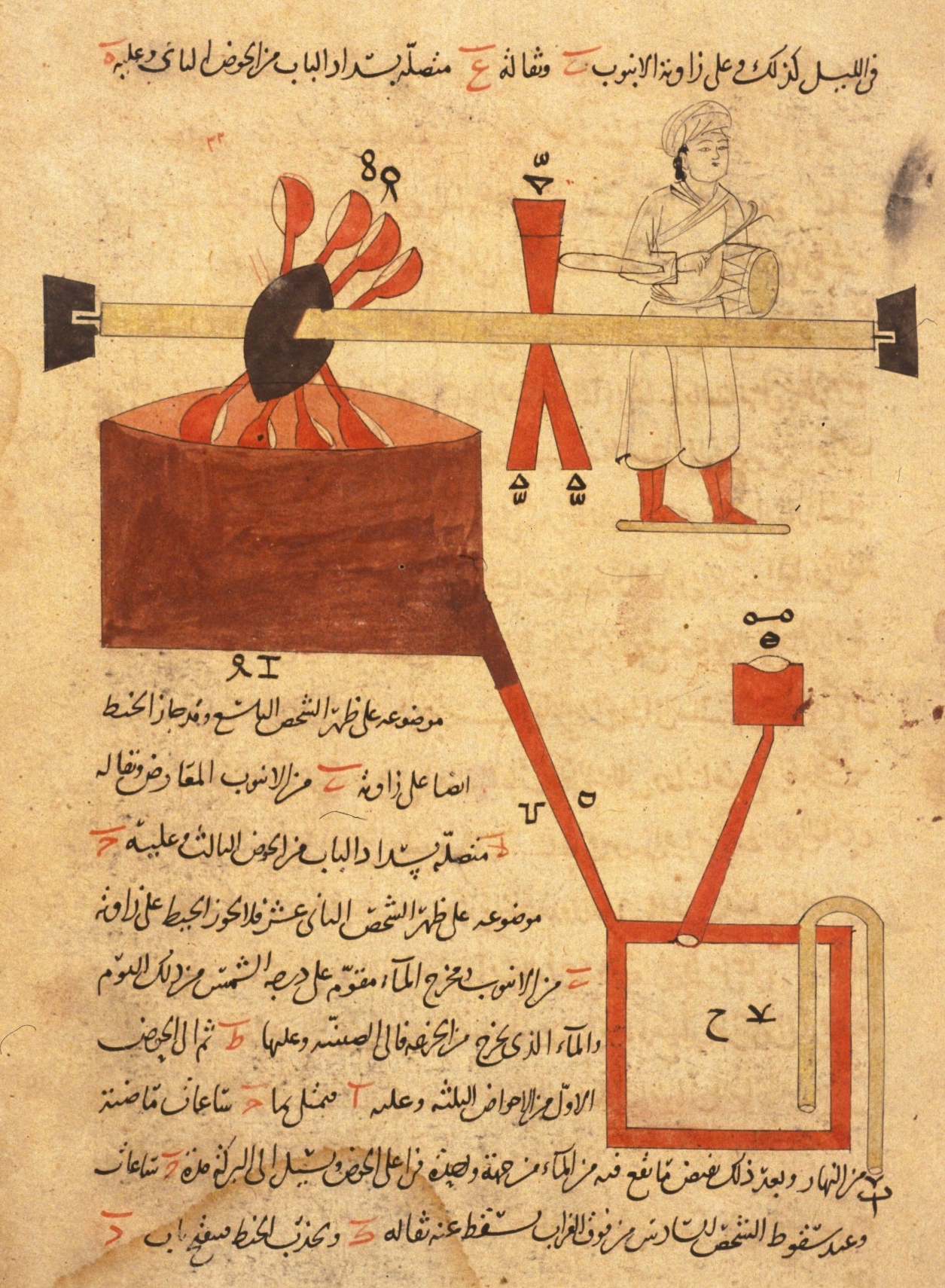 Arabic Machine Manuscript (Orient manuscript 3306)